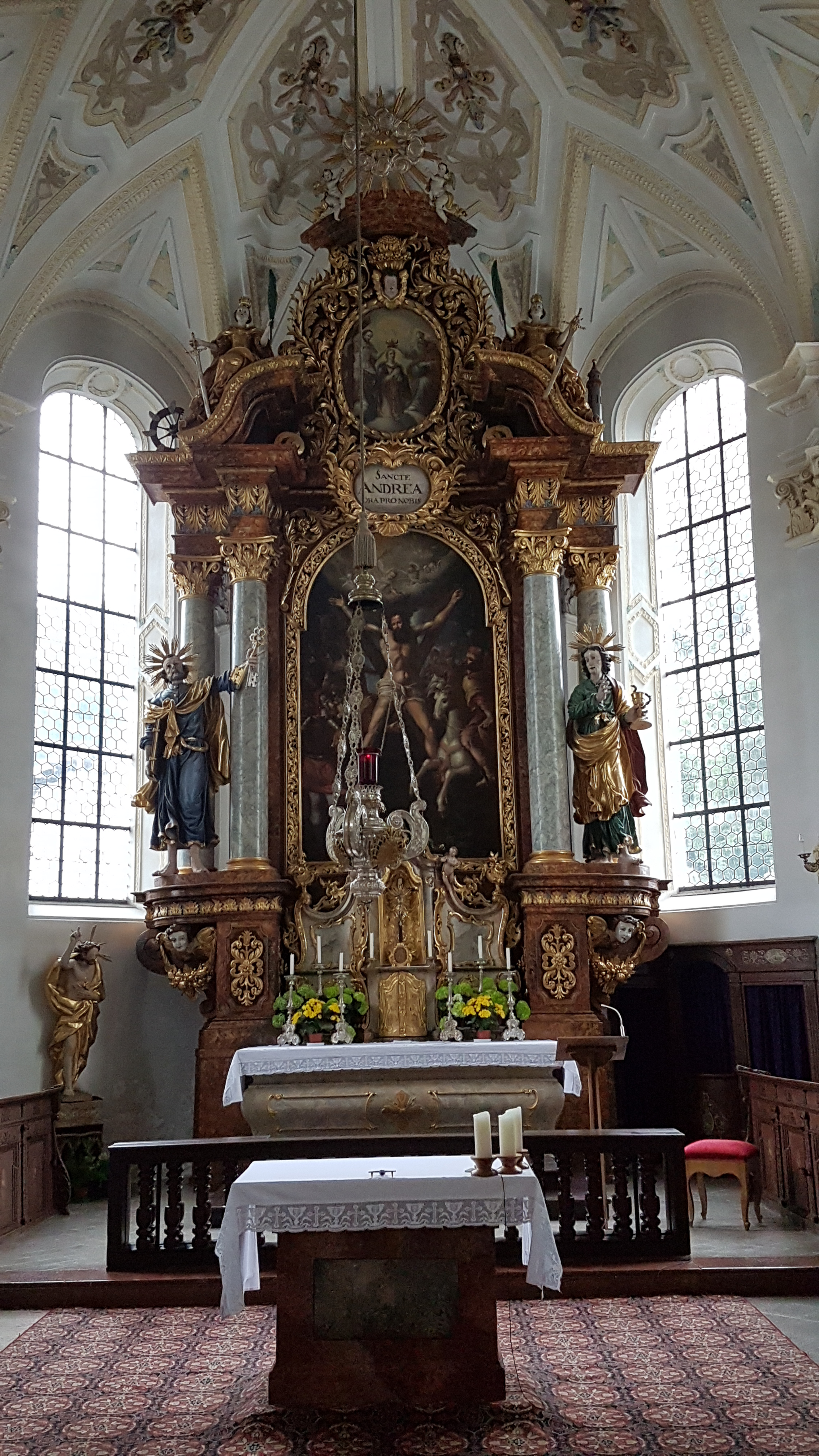 Fischbachau, Elbach, St. Andreas, spätbarocker Hochaltar (1697/1700) von Hans Berberich und Lorenz Hagn. Das Altarblatt malte Johann Vicelli.